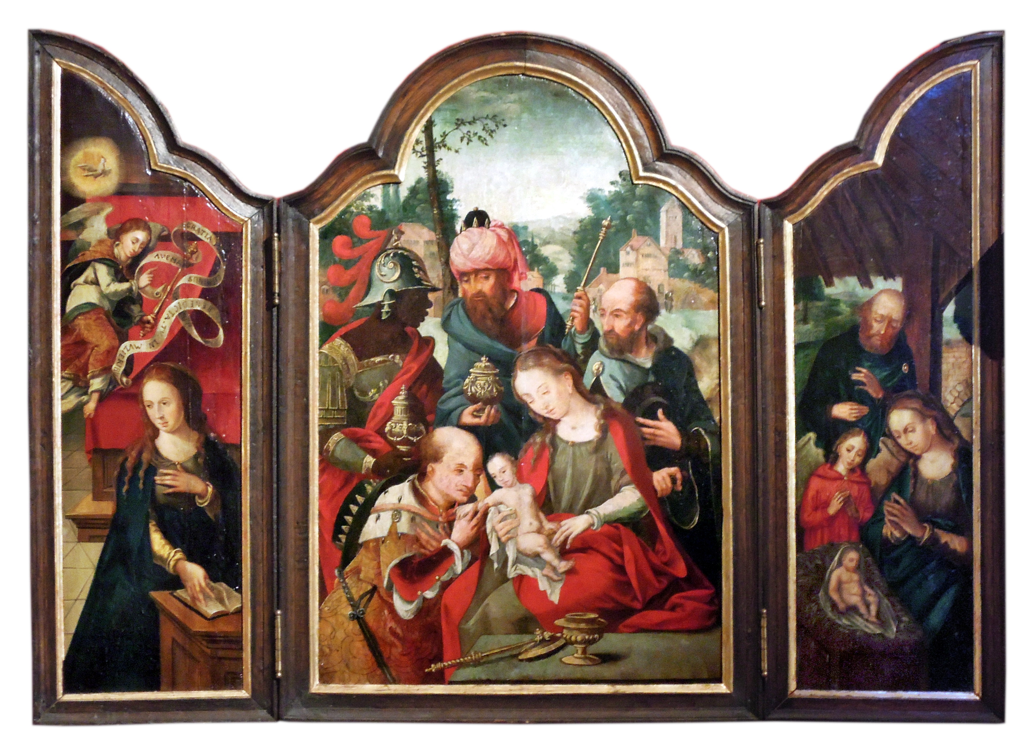 Triptychon